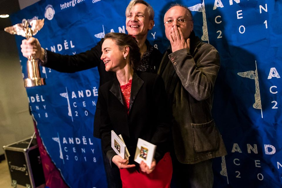 Kapela Žamboši a její bezprostřední radost po vyhlášení hudebních cen Anděl v kategorii Folk za rok 2018. CD Louvre je v kapelní historii třetím oceněným albem touto prestižní cenou.